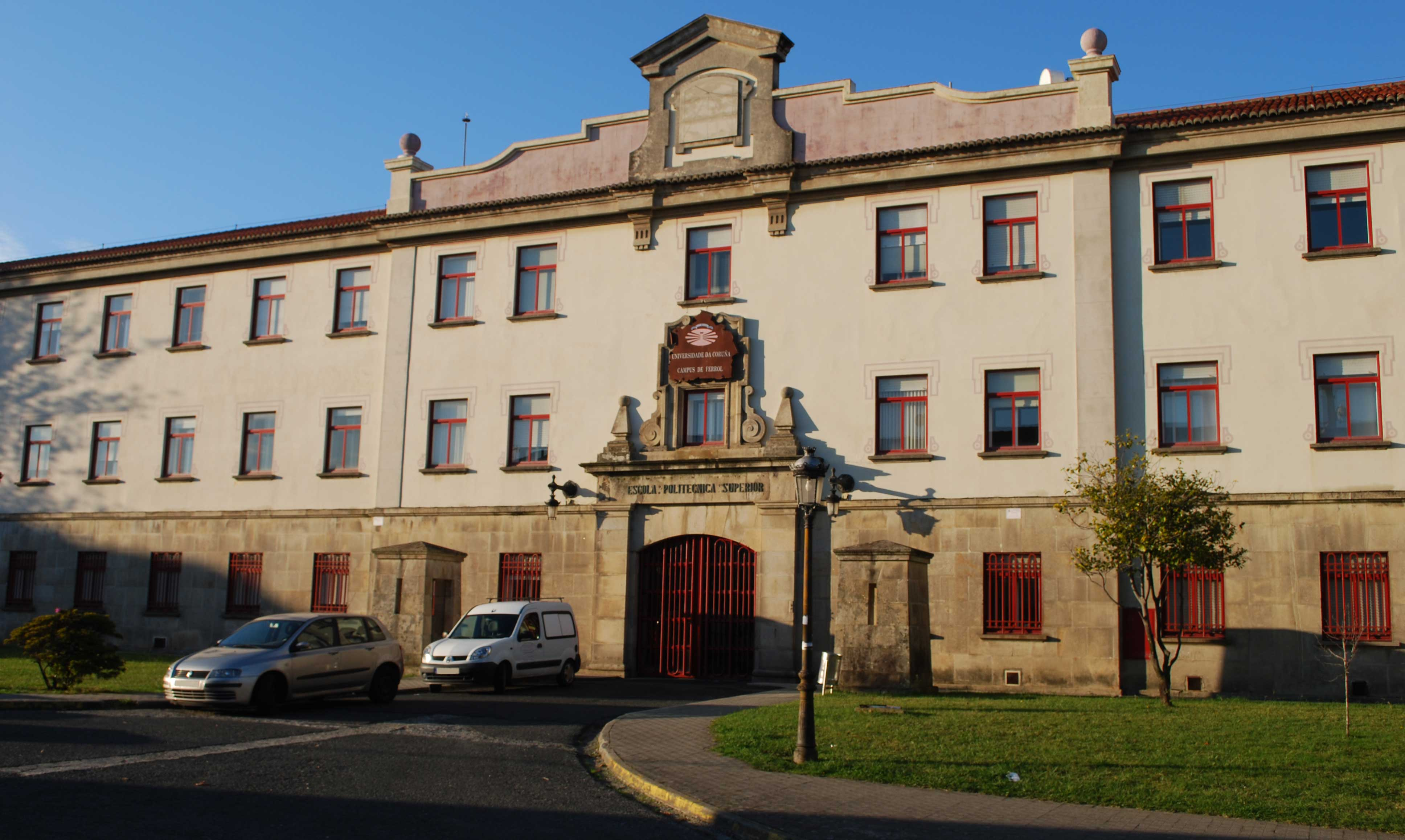 Escola Politécnica Superior Campus de Esteiro Ferrol Universidade da Coruña Galiza Spain